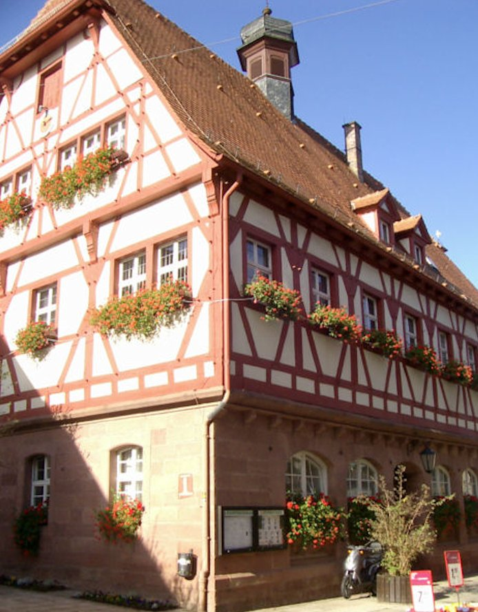 Rathaus der Stadt Walldürn